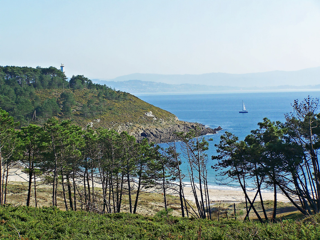 Praia de Cabohome, Donón, O Hío, Cangas.